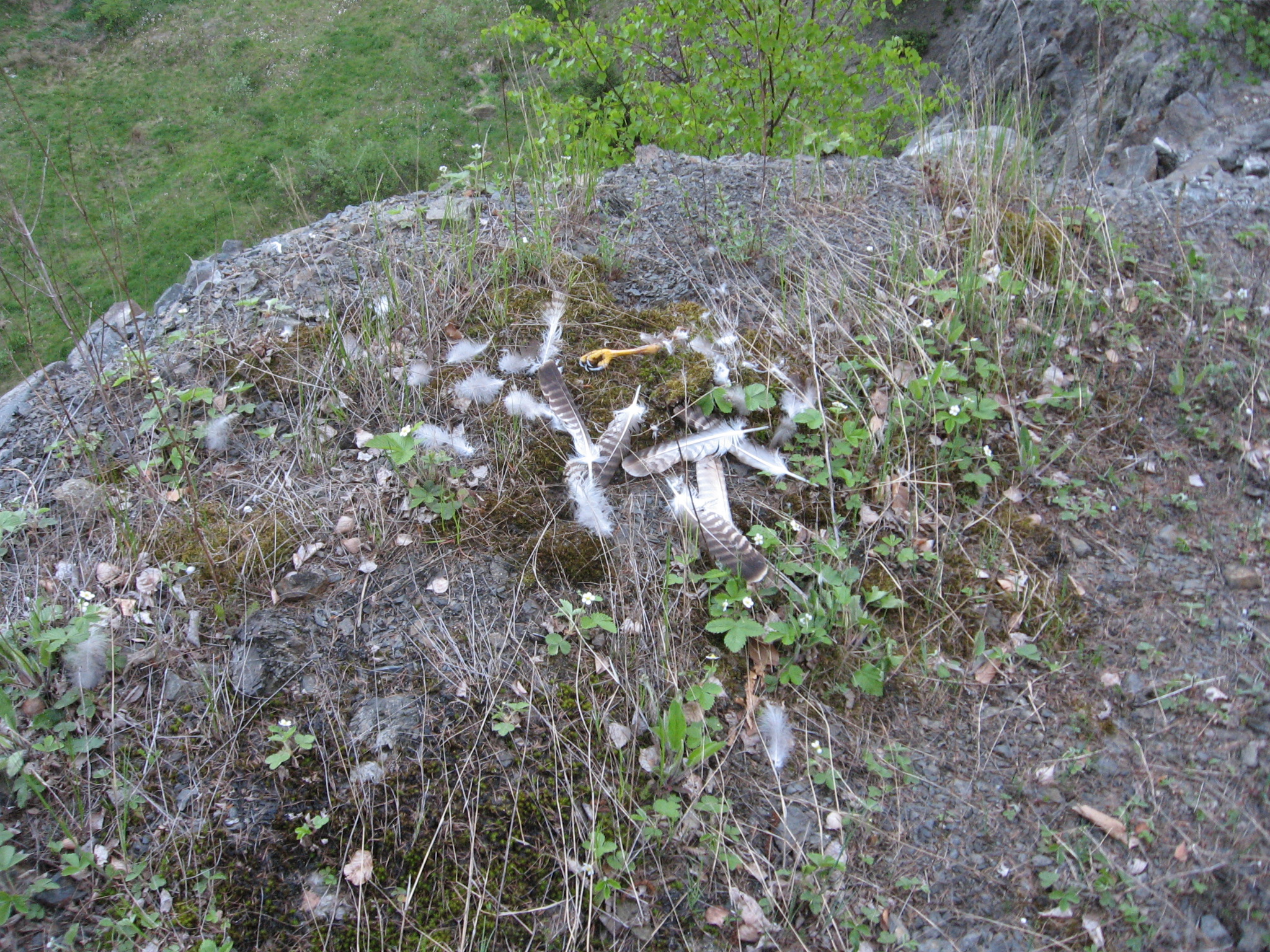 Rupfung eines Mäusebussards an Uhubrutplatz im Sauerland, English = Plucking of a Common Buzzard on an Eagle Owl breeding place in Germany